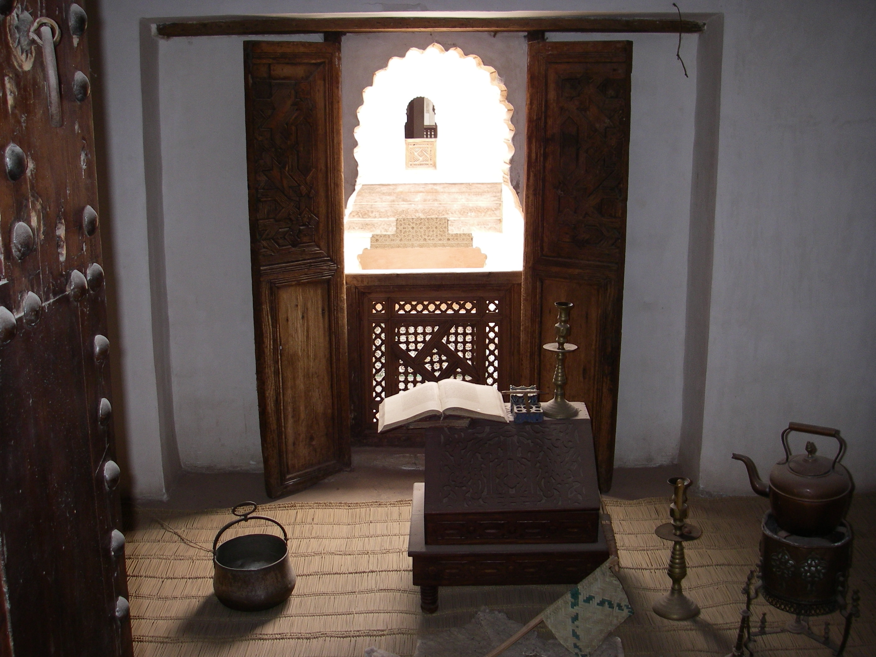 Marrakech: Médersa Ben Youssef